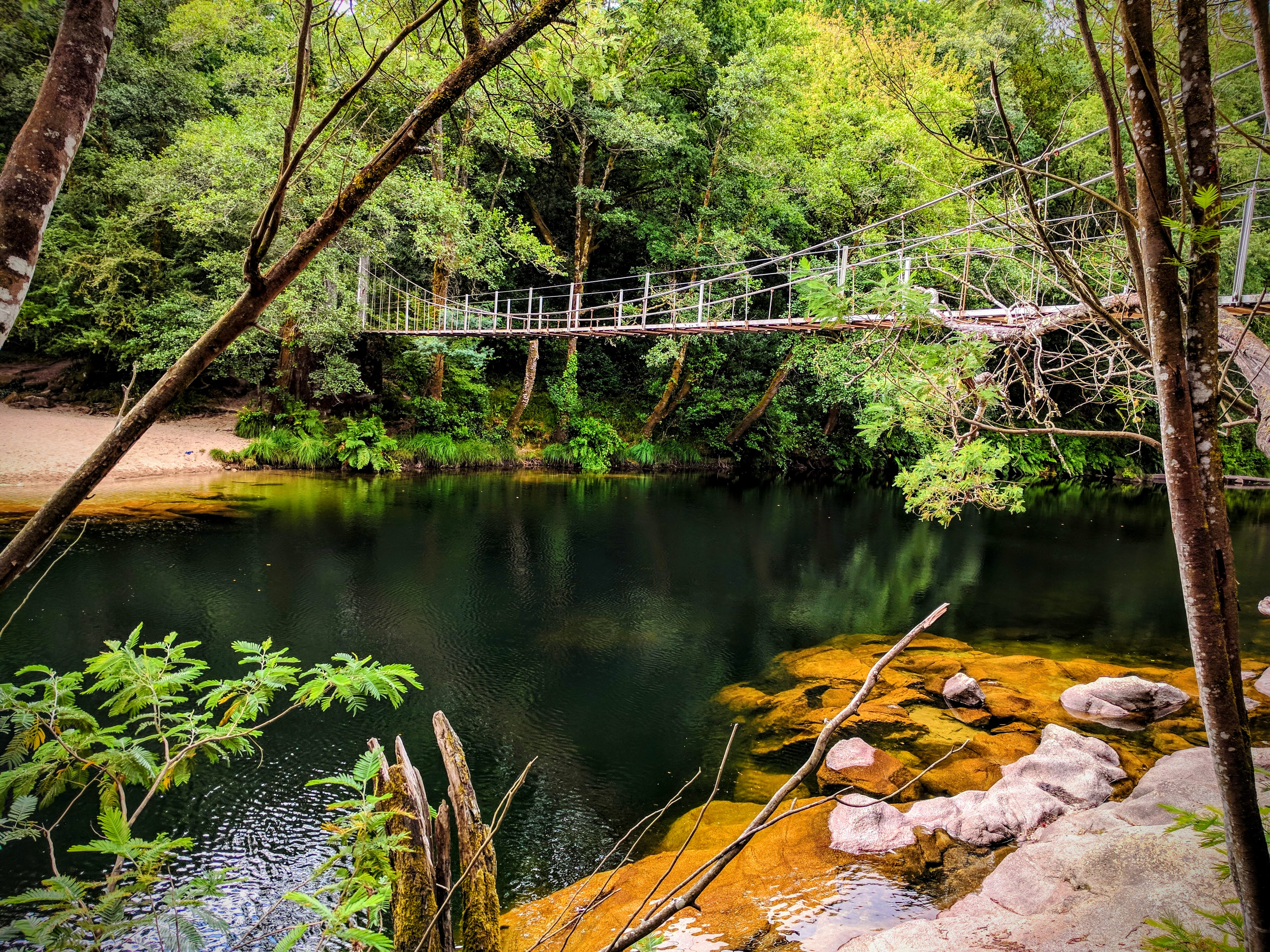 Puente colgante sobre el río Verdugo, en Soutomaior, Arcade (Pontevedra).